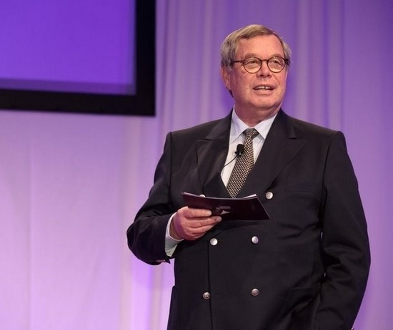 Dies ist ein Portrait von Willi Schalk, welches im Buch "Das Jahrbuch der Werbung" veröffentlicht wurde.